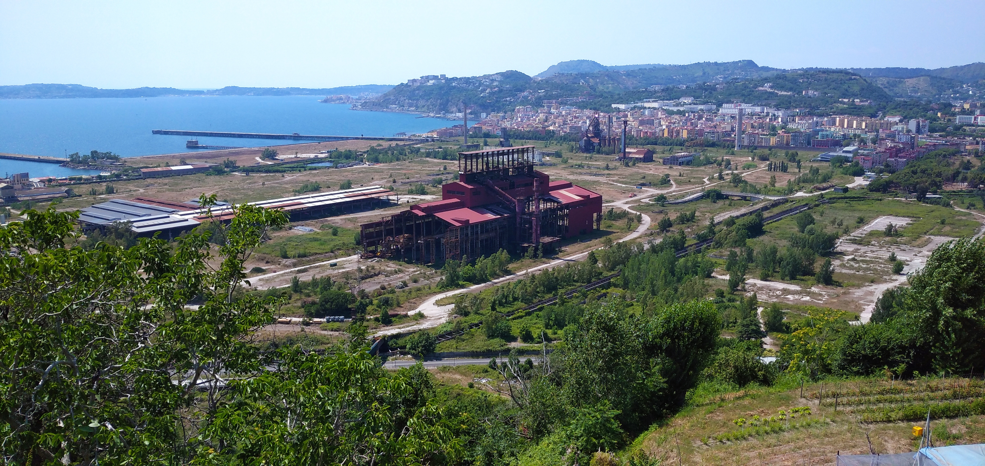 Area ex italsider di Bagnoli